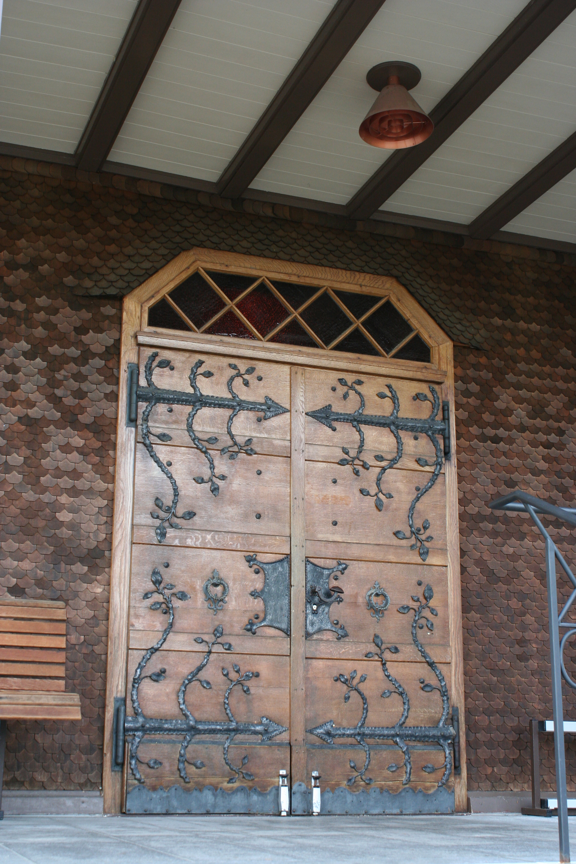 Römisch-katholische Pfarrkirche St. Antonius Egg, Eingangsportal